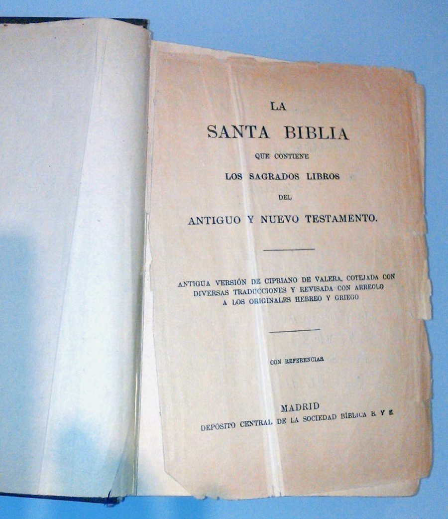 Fotografía de la Biblia de Sara García tomada en un domicilio particular de Cáceres capital.